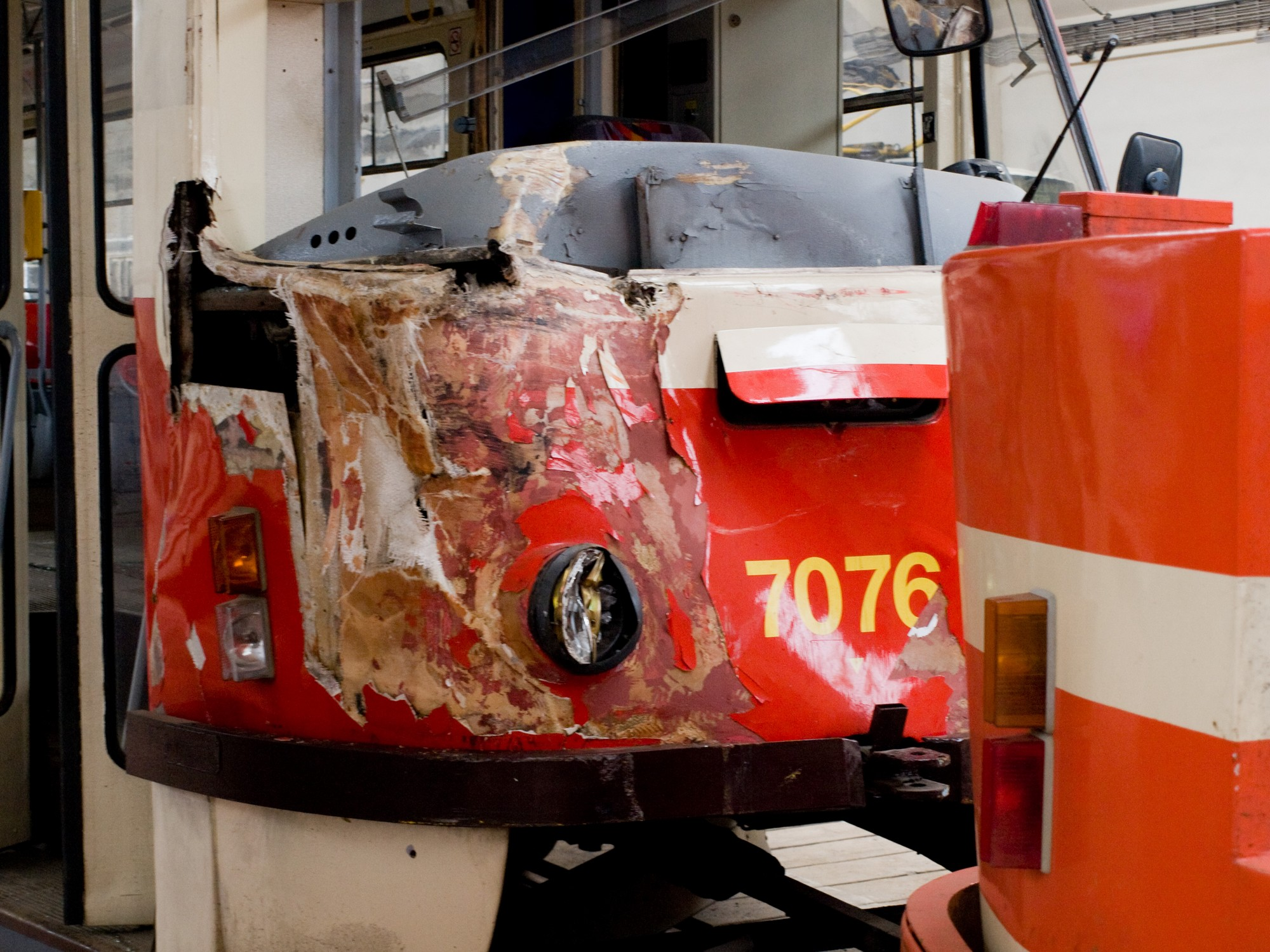 Vůz 7076 zdemolovaný po nehodě s autobusem